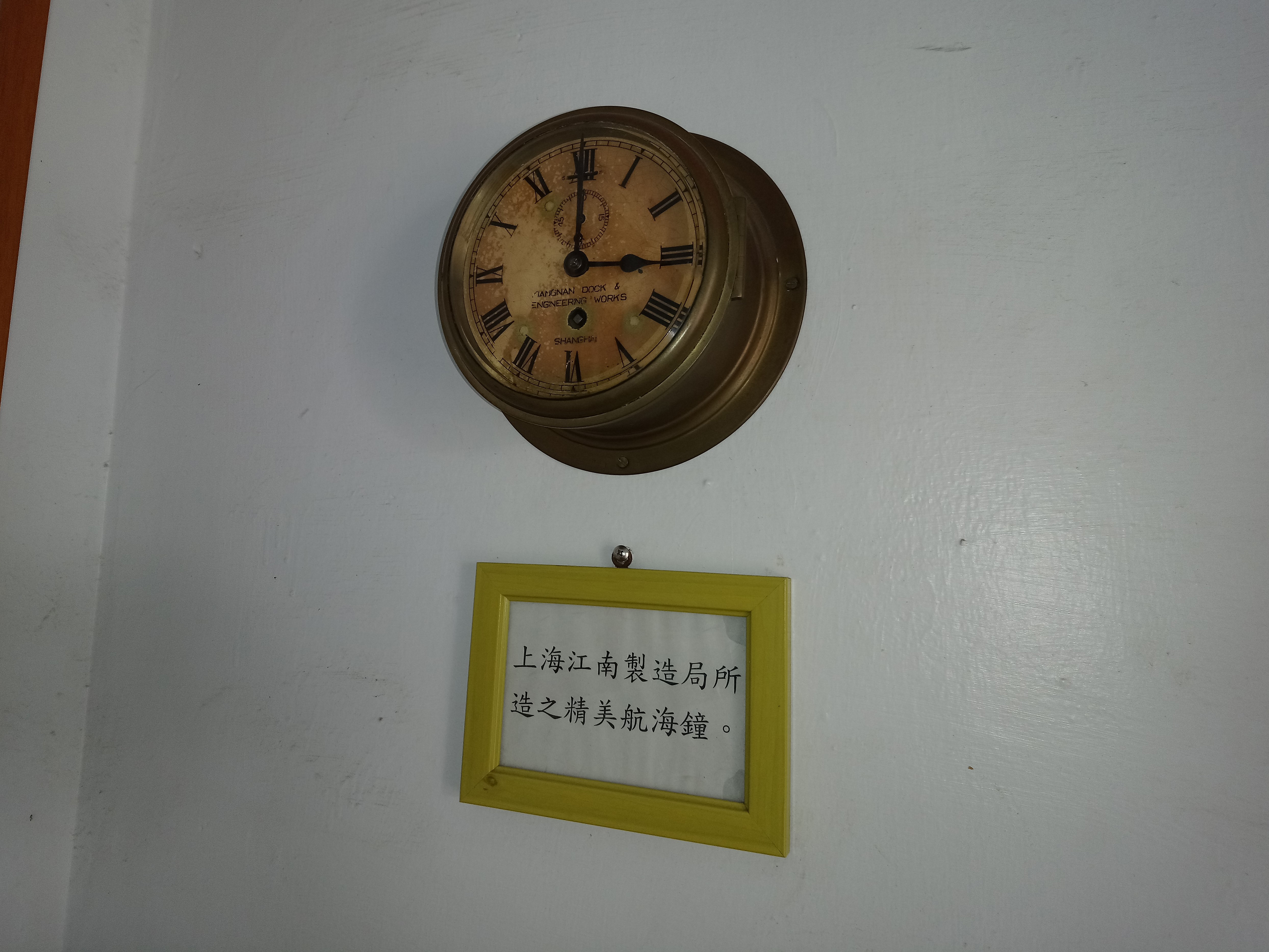 上海江南制造局所造航海鐘,桃園市觀音區觀音地區觀音里